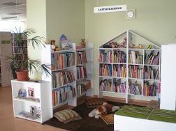 Laste lugemisnurk